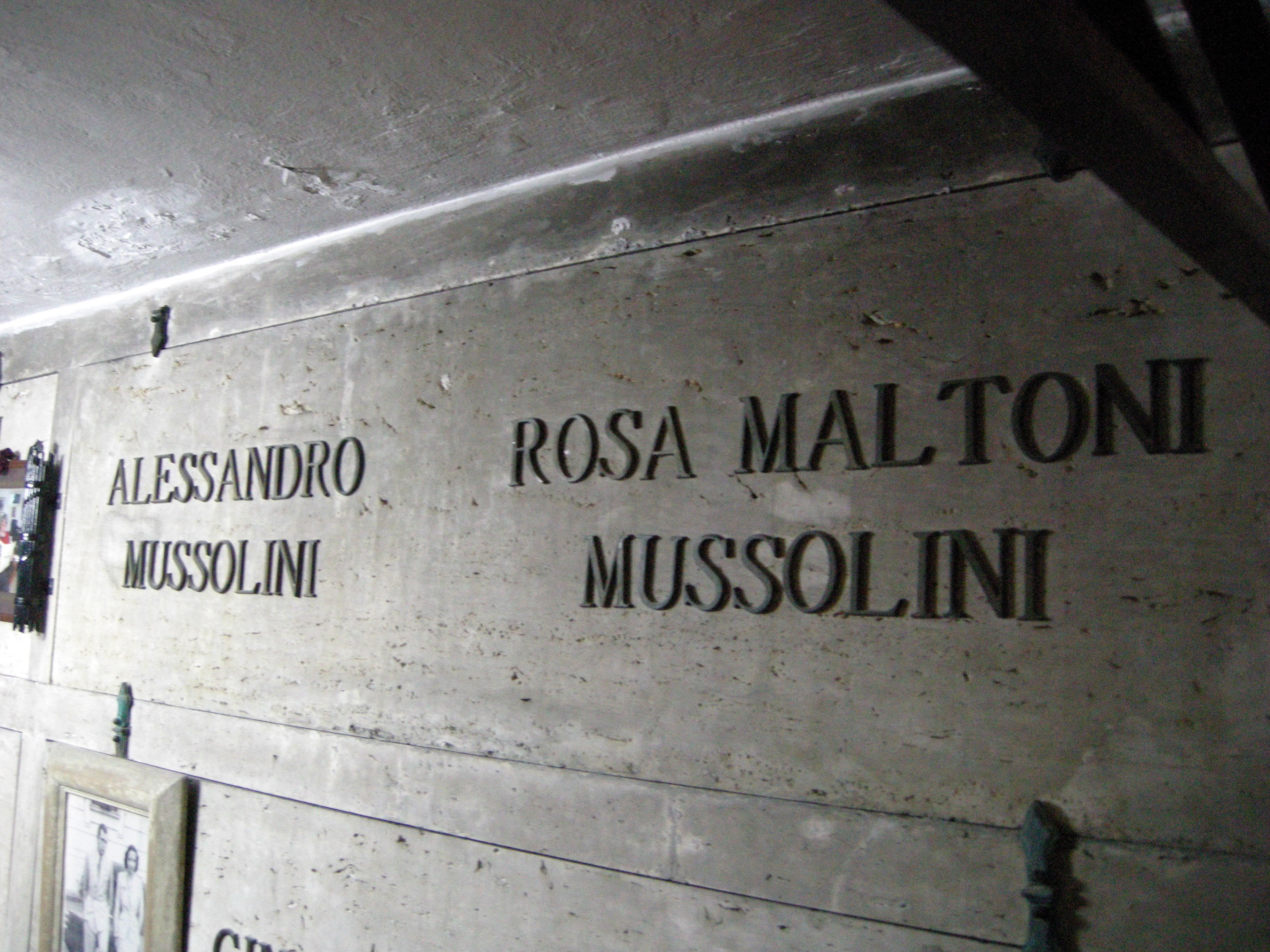 Cripta del cimitero di San Cassiano a Predappio, tombe della famiglia Mussolini